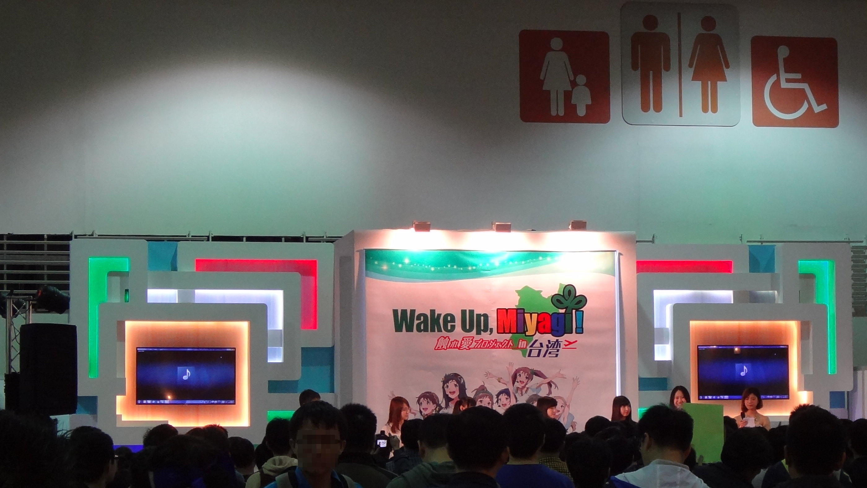 2016年第四屆台北國際動漫節A舞台，群英社國際舉辦的《Wake Up, Girls!》「Wake Up, 宮城！相親相愛in台灣」見面座談會。依會場規定，只能拍攝最外圍。